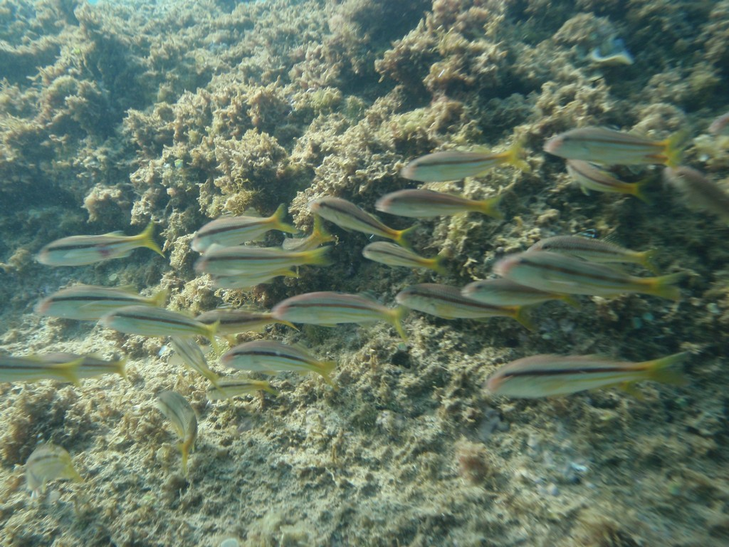 Banco di Upeneus moluccensis